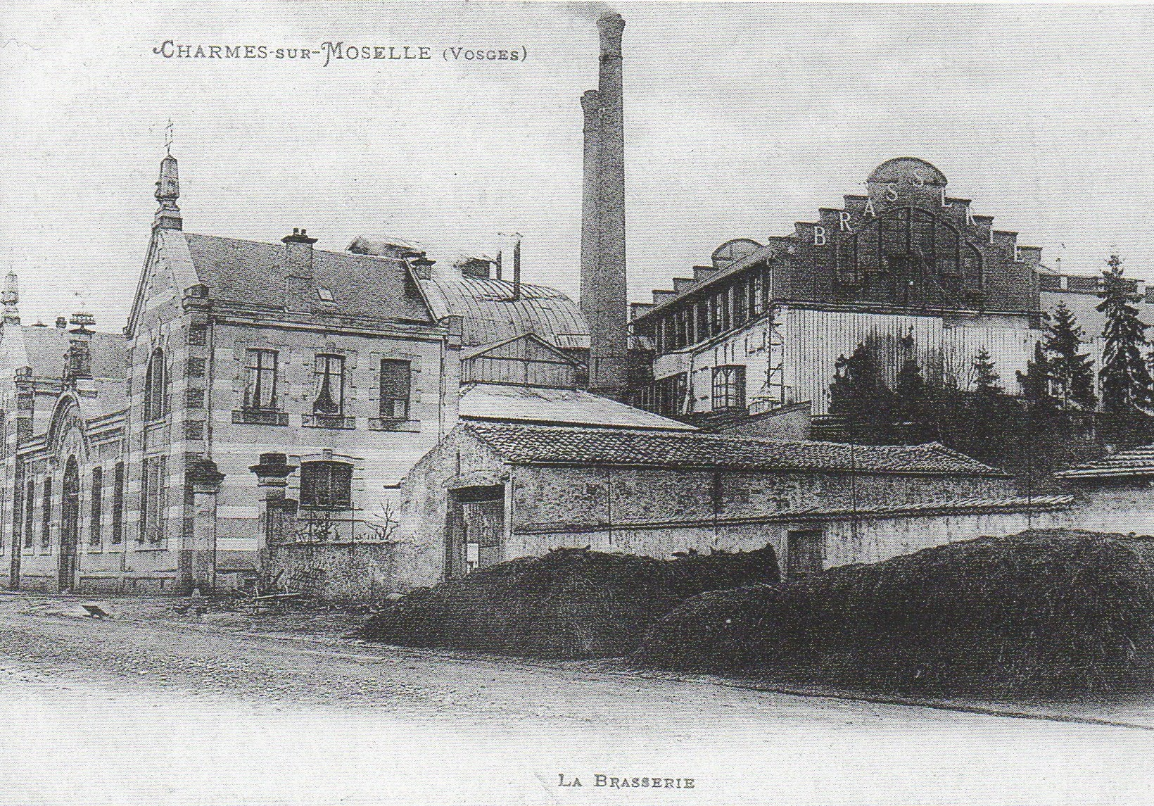 La brasserie de Charmes telle qu'elle existait au début du Template:XXIe siècle